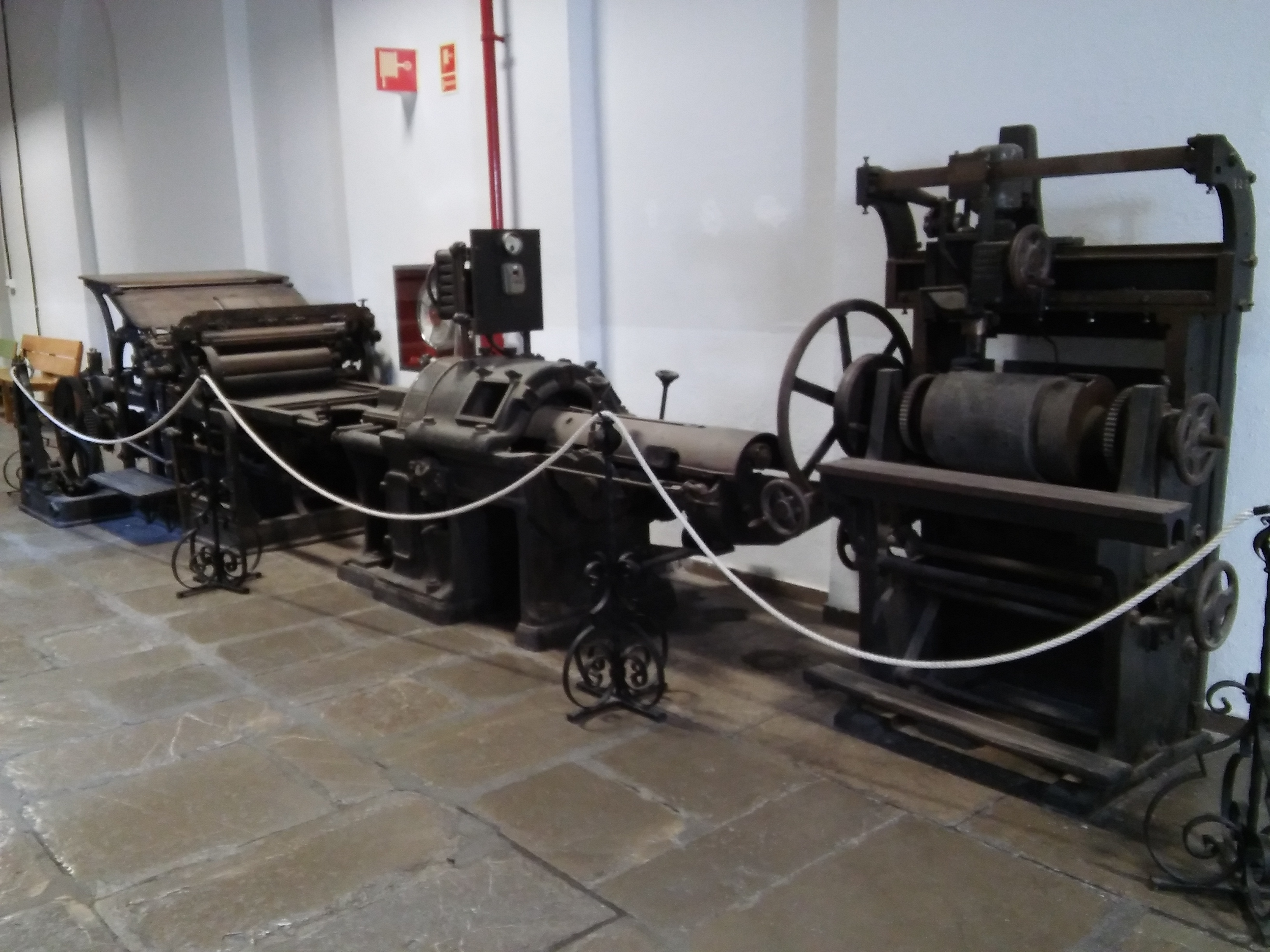 Colegio Máximo de la Compañía de Jesús Facultad de Comunicación y Documetación Universidad de Granada (España)